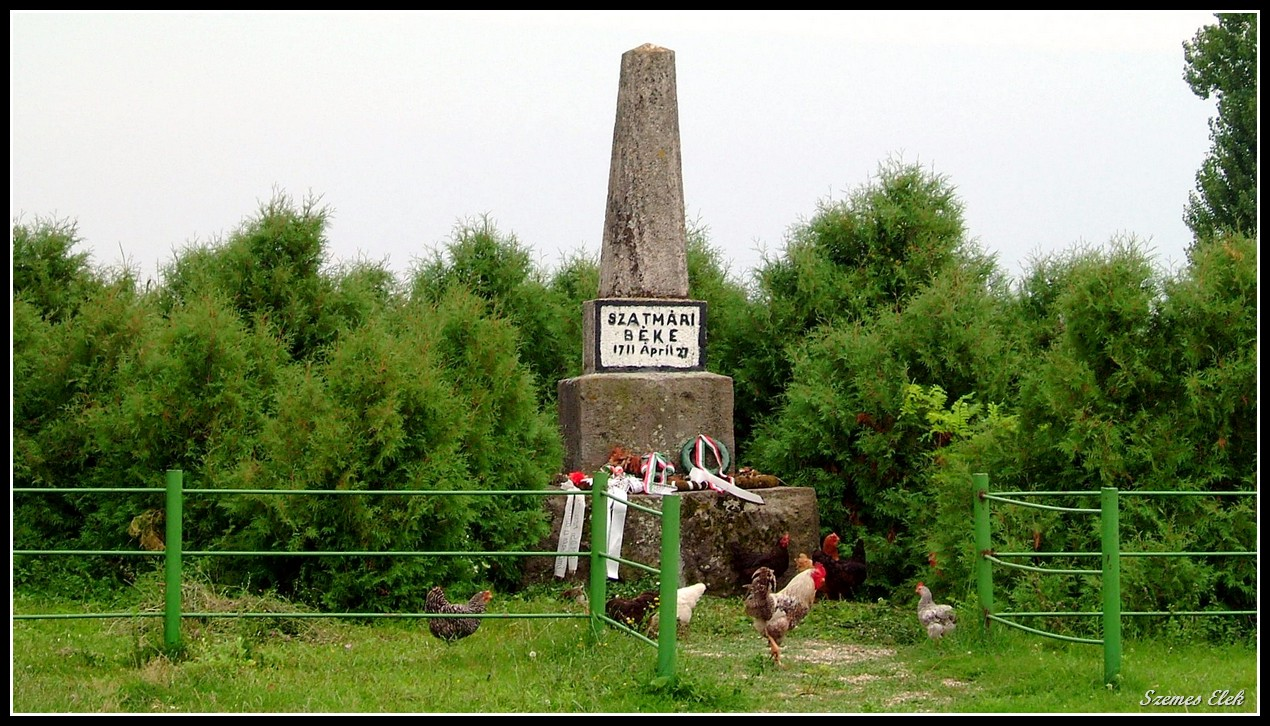 Moftinu Mic 447200, Romania